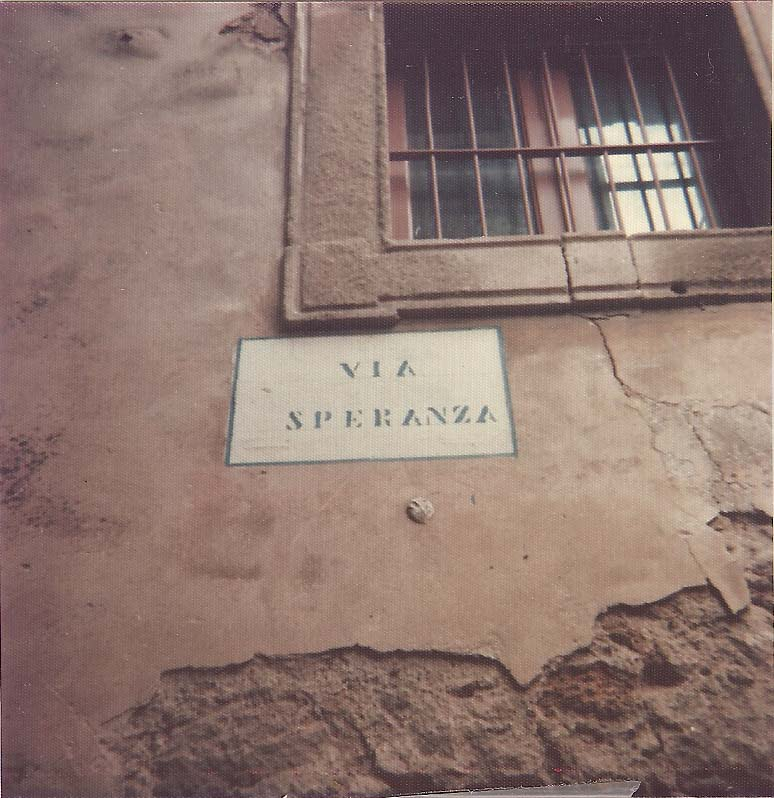 Foto da Via Speranza tirada em 1978